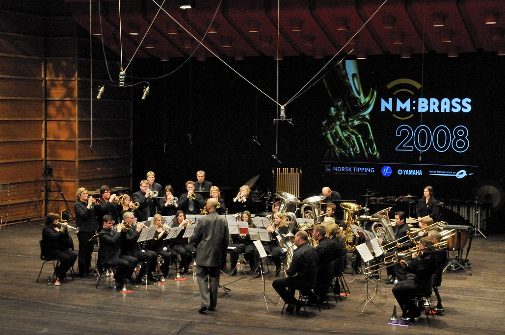 Brøttum Brass under NM for Brass Band i Bergen 2008